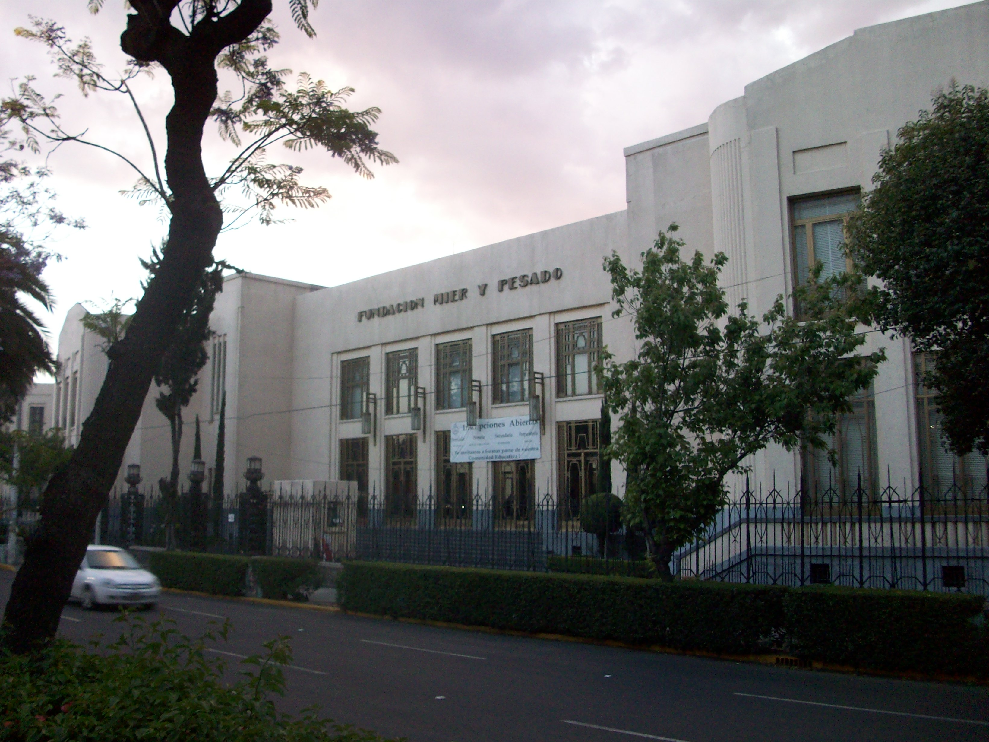 Fachada de escuela de la Fundacion Mier y Pesado en Calzada de Guadalupe